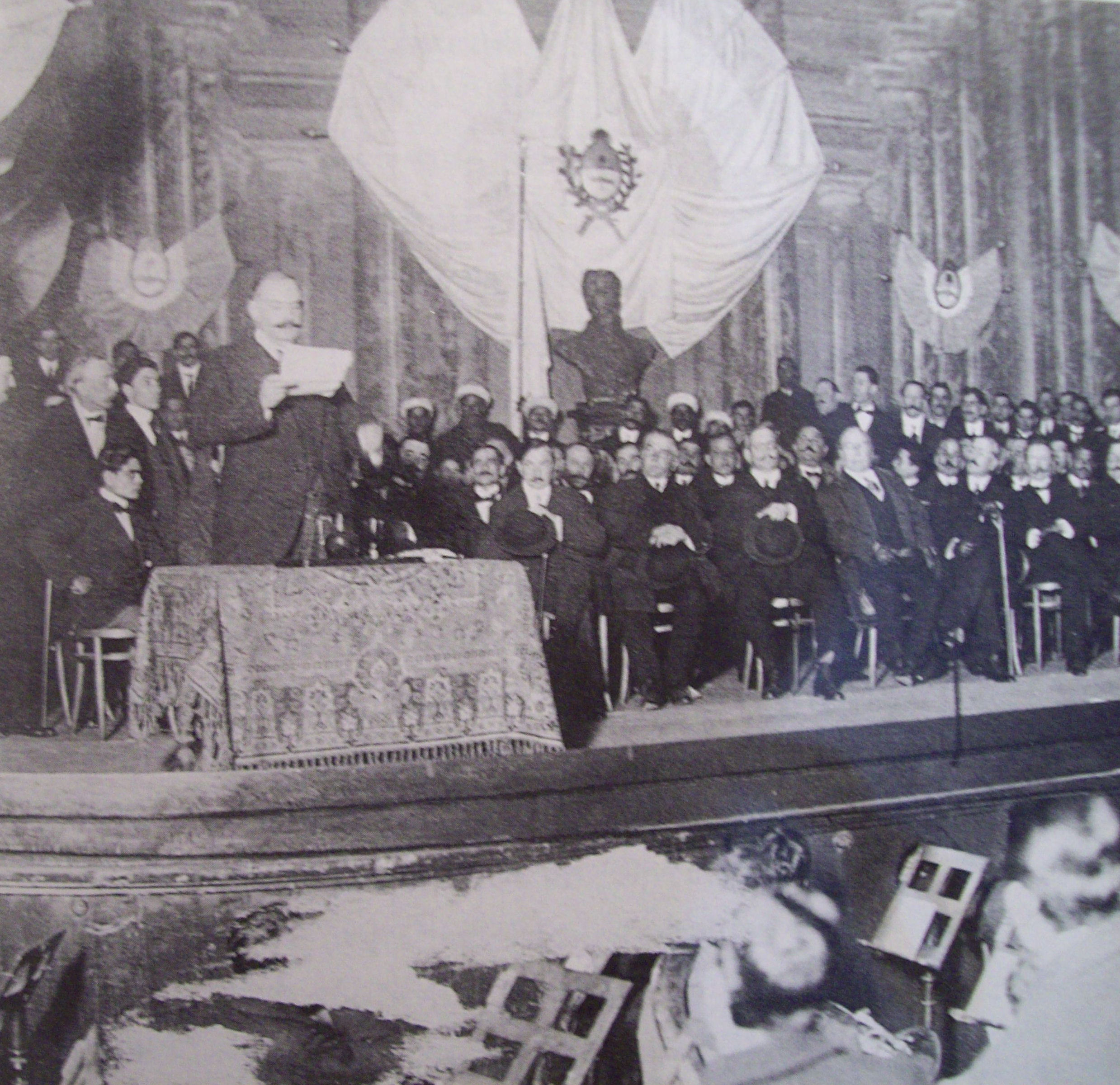 El diputado doctor Marcelo T. de Alvear dando oratoria en el Teatro argentino de La Plata, en el año 1915.